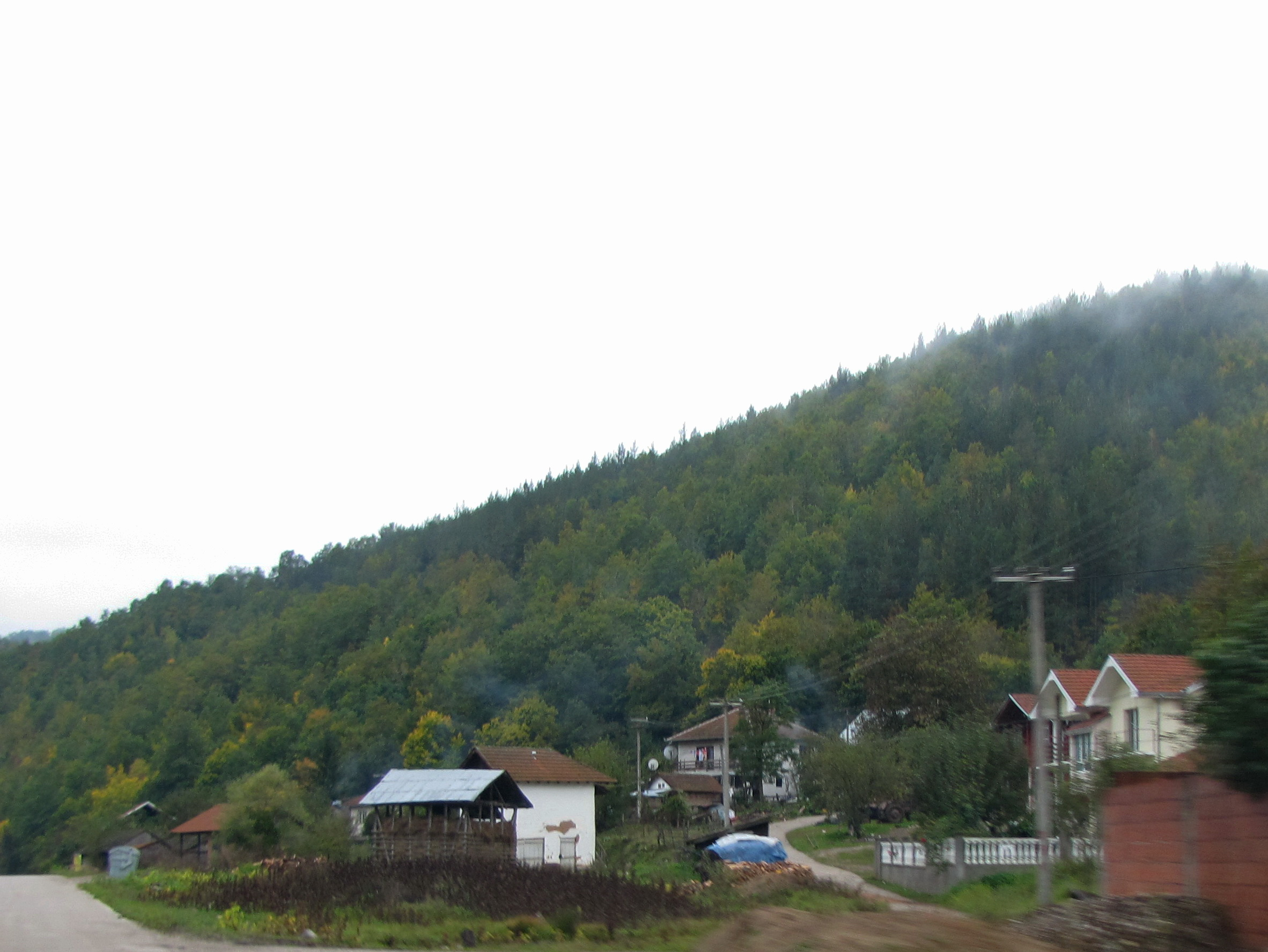 Село Млекоминци (Босилеград).